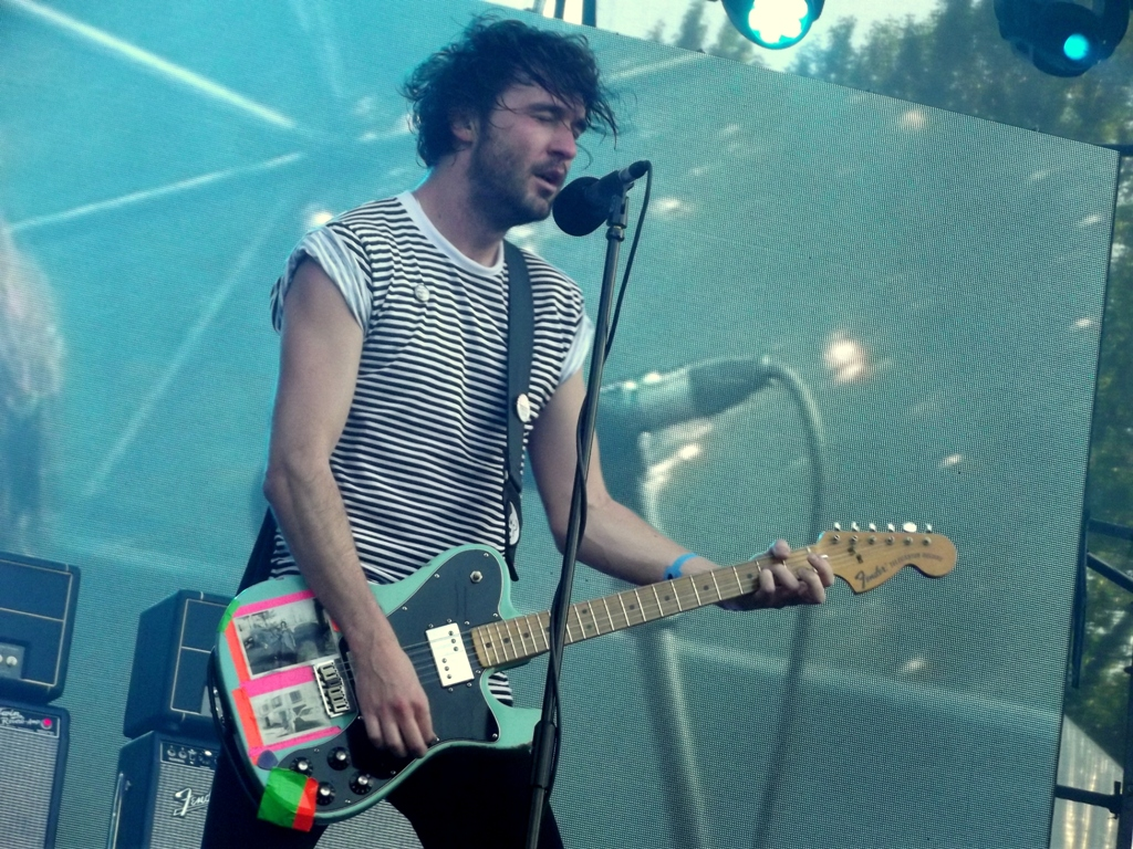 Zdjęcie zrobione podczas OFF Festival 2013 w katowickiej Dolinie Trzech Stawów.